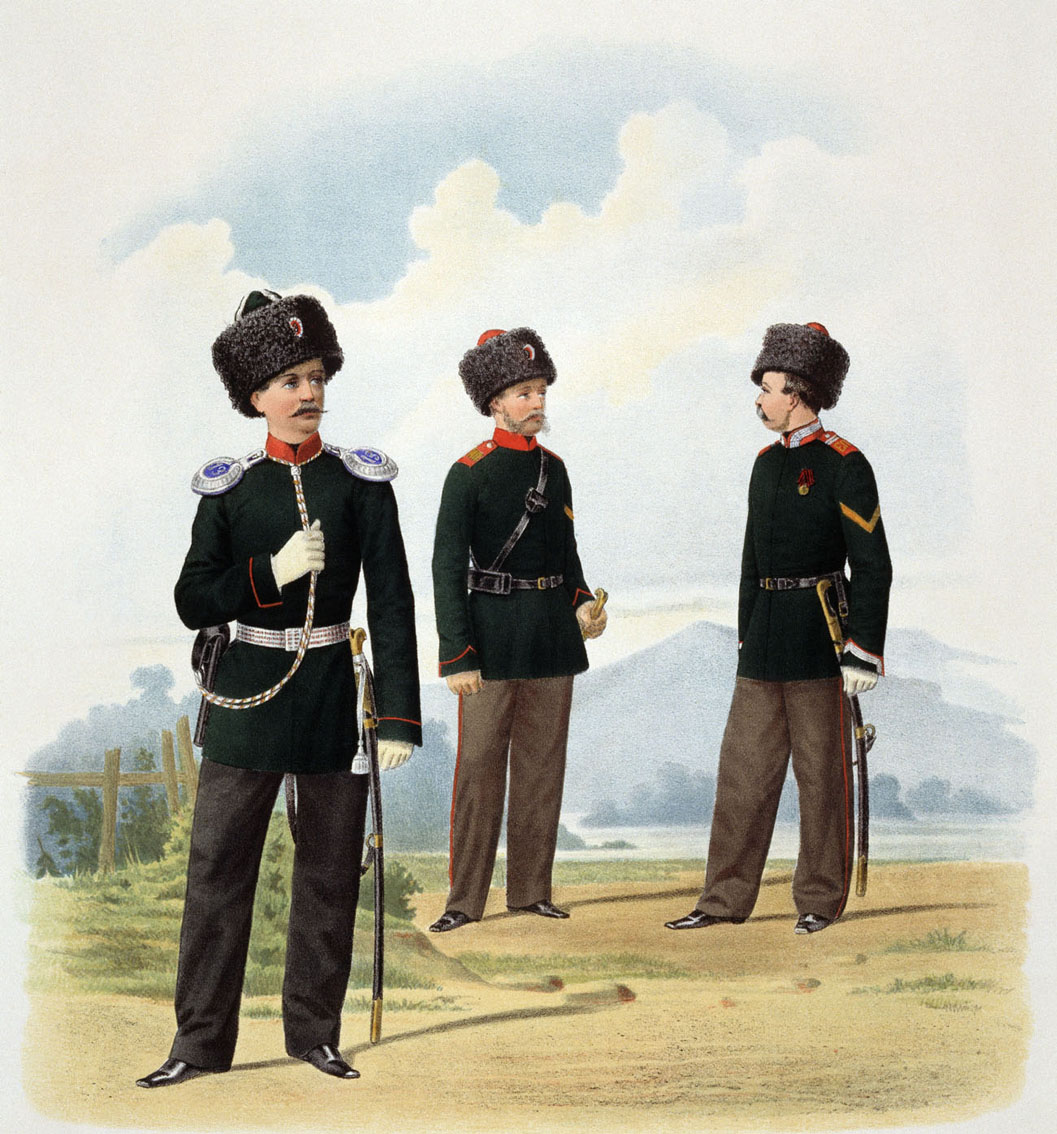 Пешие батальоны Забайкальского Казачьего Войска и Конные: Иркутский и Енисейский Казачьи полки, 21 октября 1867. (В парадной форме).